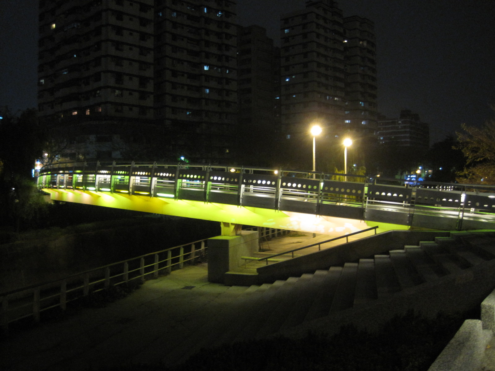 中文（台灣）: 高雄市光雕橋。